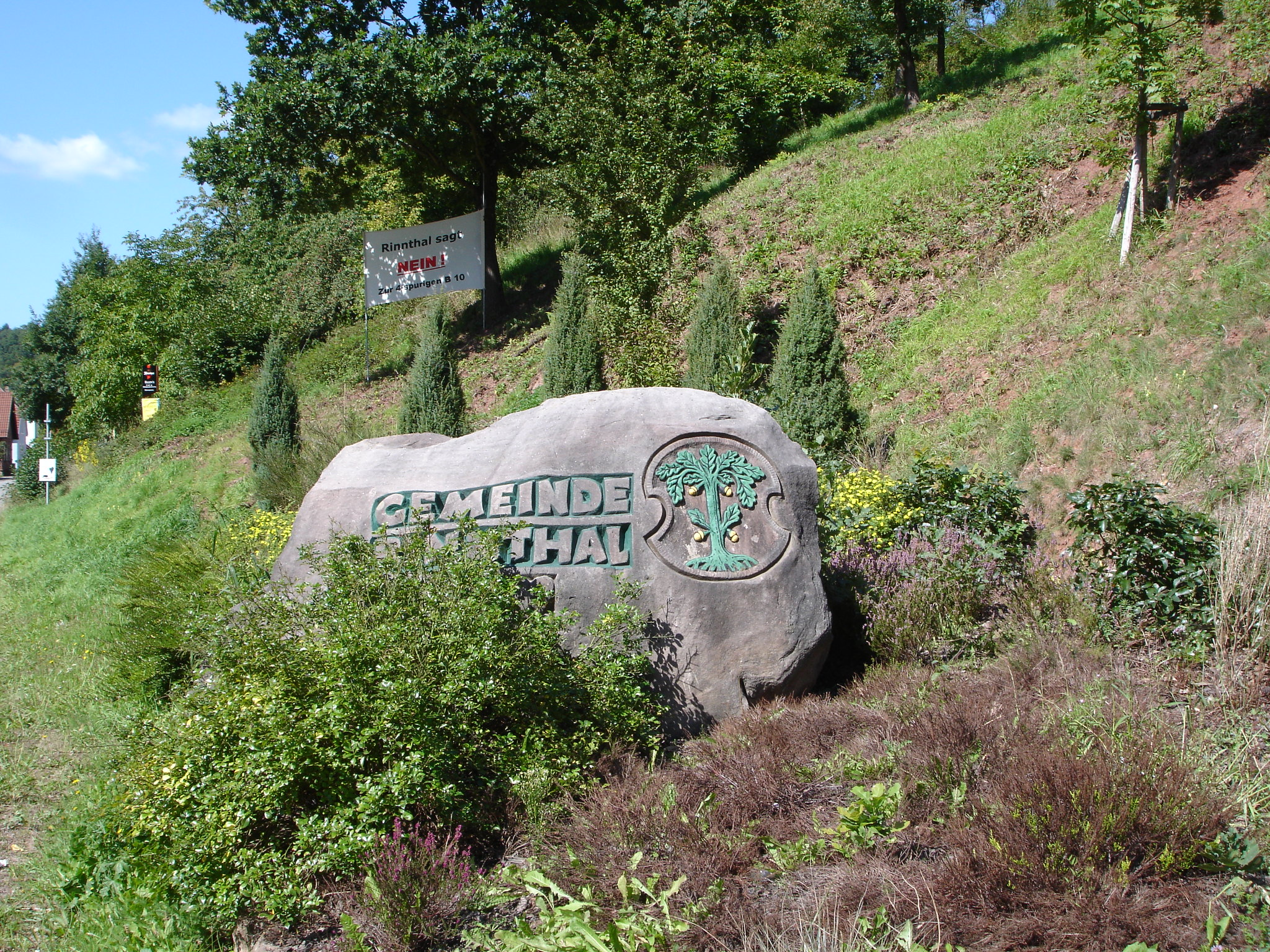 Ortseingang von Sarnstall kommend